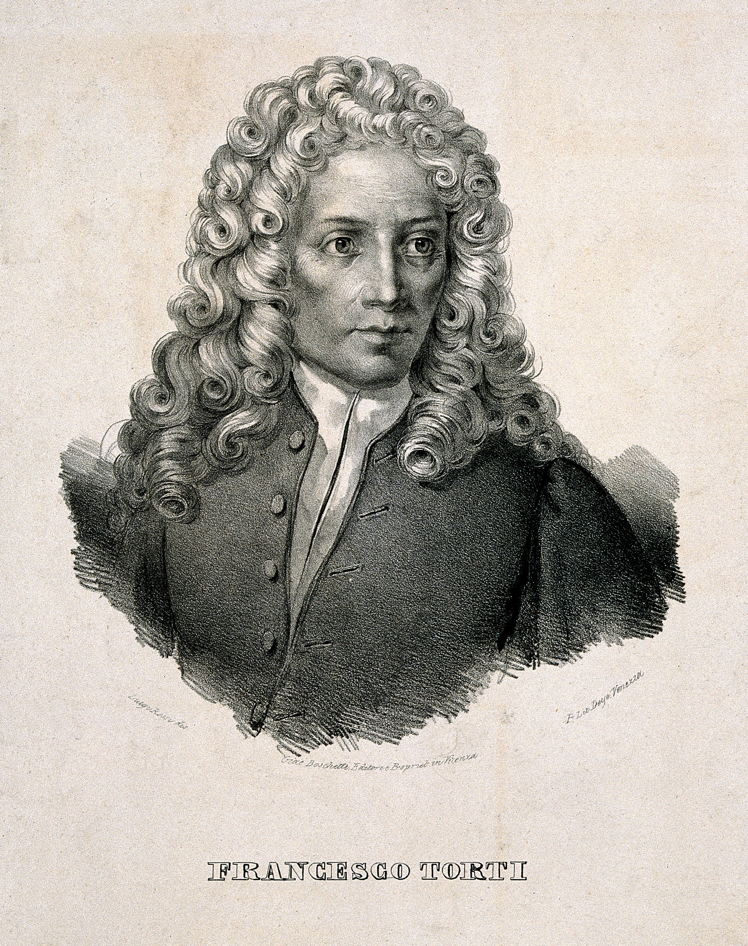 Genre/Technique: Portrait prints. Lithographs. Subject name: Torti, Francesco, 1658-1741.